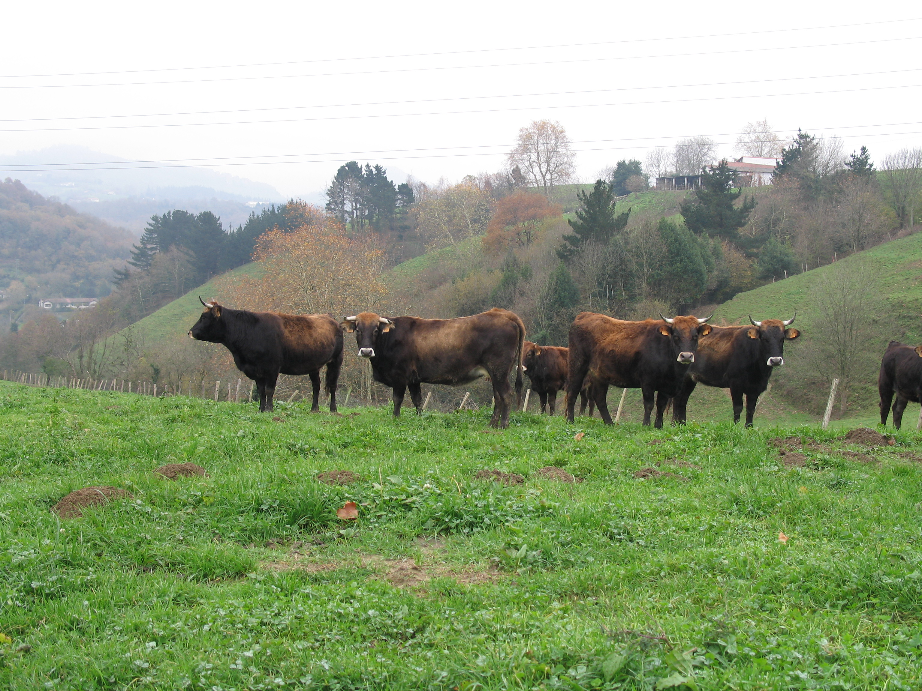 Terreña arrazako behien samalda bat